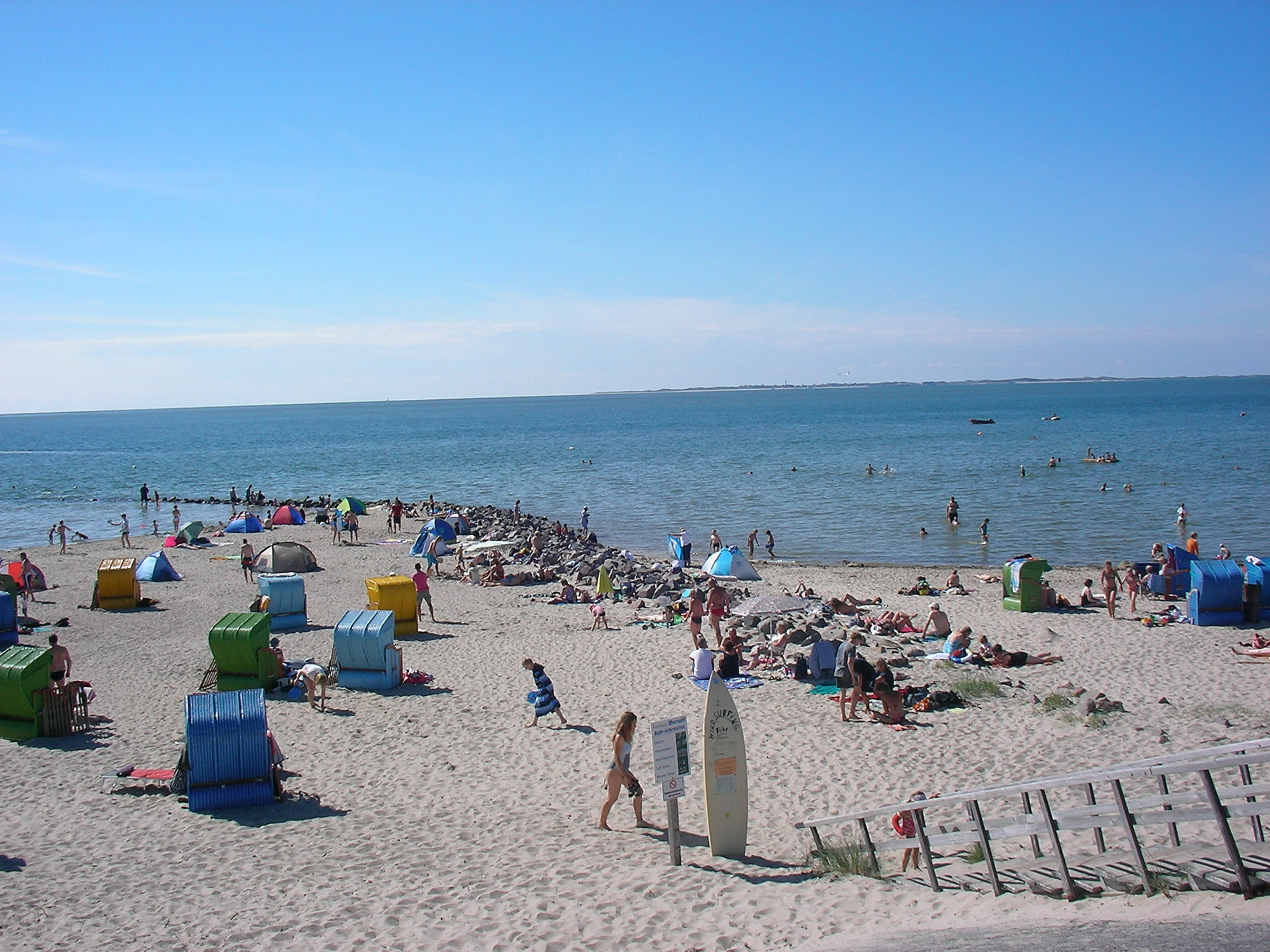 Utersum